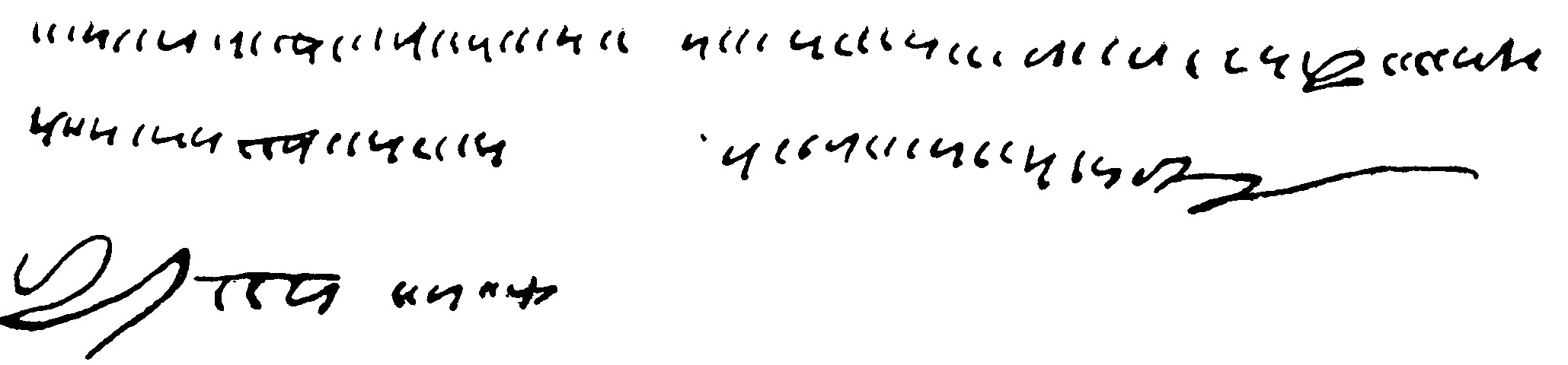 Подпись Пугачёва под указом